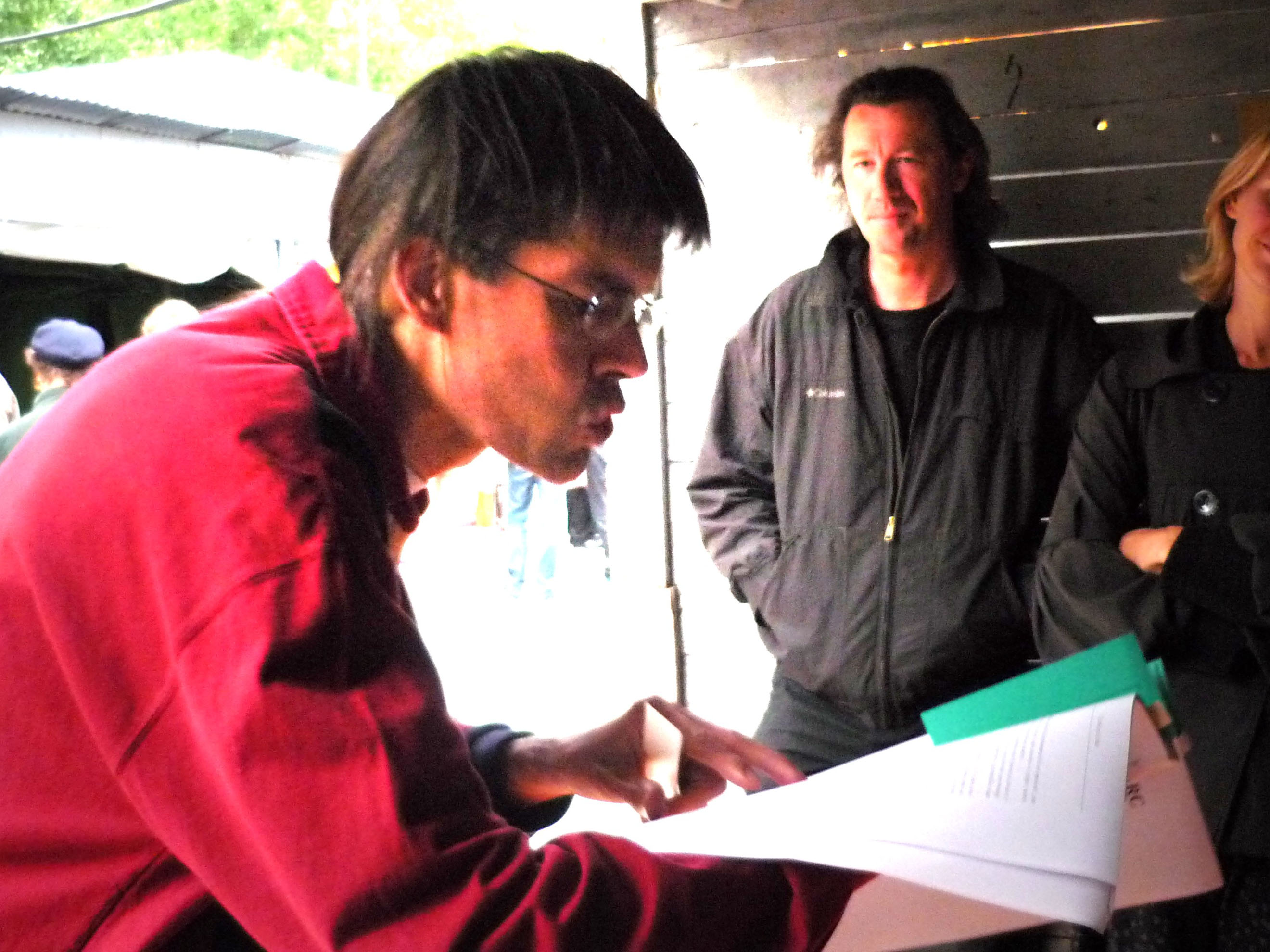 Lecture d'Alain Marc à la soirée « 100 poètes + 100 artistes = 200 minutes de poésie » de la Périphérie du Marché de la poésie le mercredi 16 juin 2010